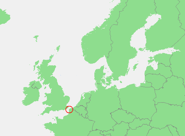 Nauw van Calais